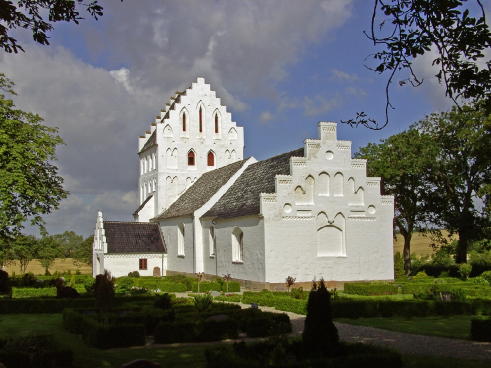 Asperup (Middelfart) fra sydøst